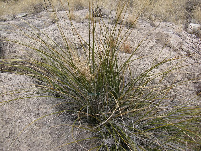 Nolina micrantha mit Blütenresten im Frühjahr